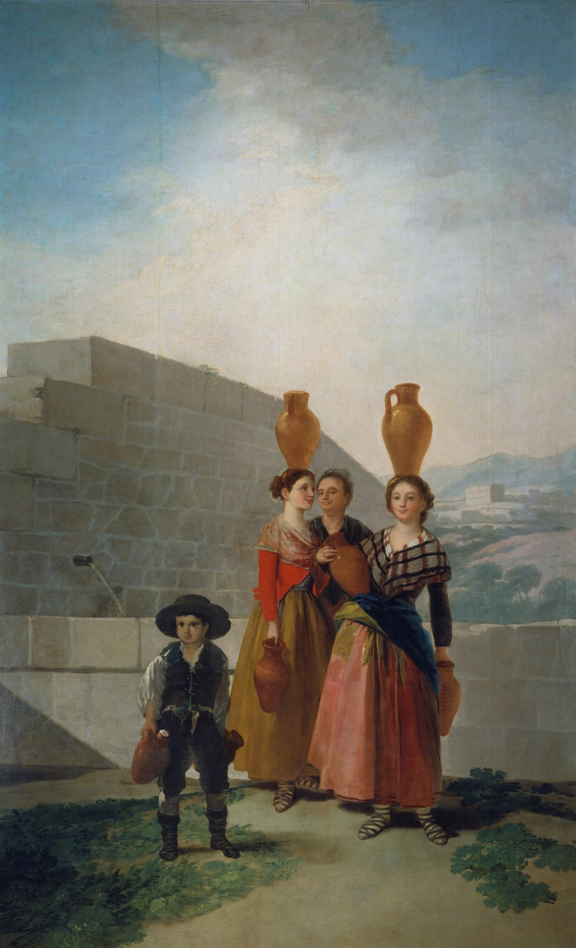 Serie Cartones para tapices.